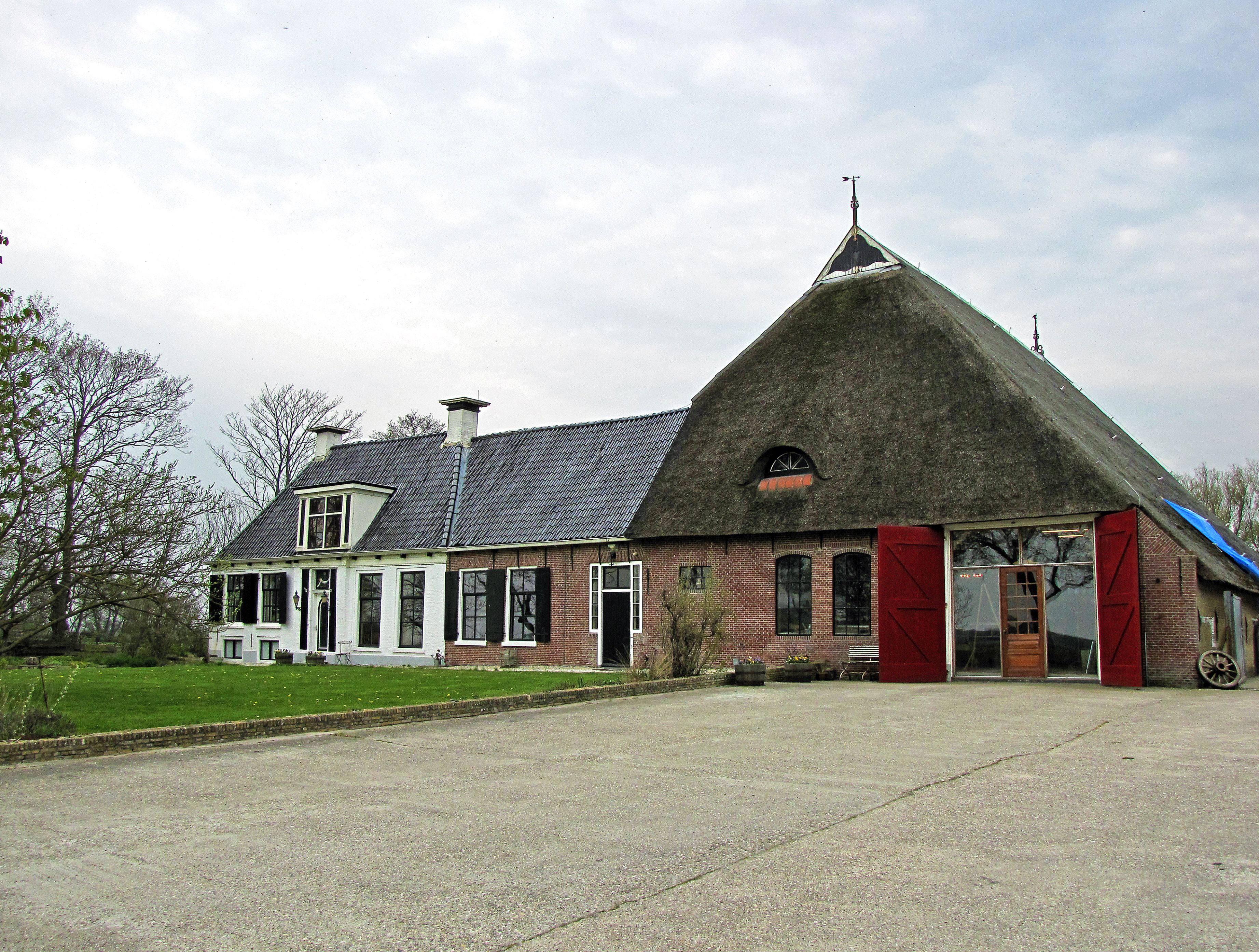 Harkema state aan de Hoarnestreek onder Tzummarum, overzicht vanuit het noordwesten.